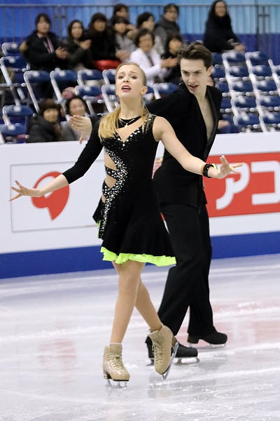 Арина Ушакова / Максим Некрасов (Россия) на финале юниорского Гран-при 2017-2018